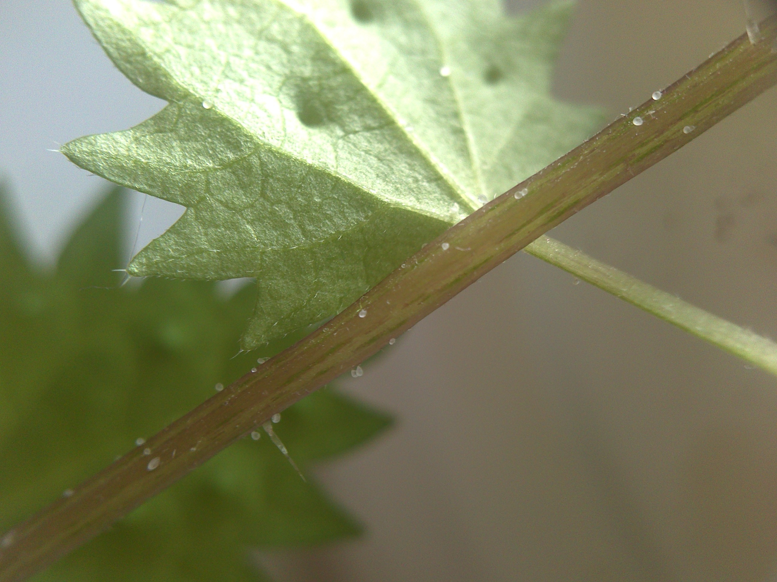 Blattunterseiten- und Stängelansicht einer Mallorca-Brennnessel (Urtica bianorii) mit Borsten- und Brennhaaren sowie Perldrüsen